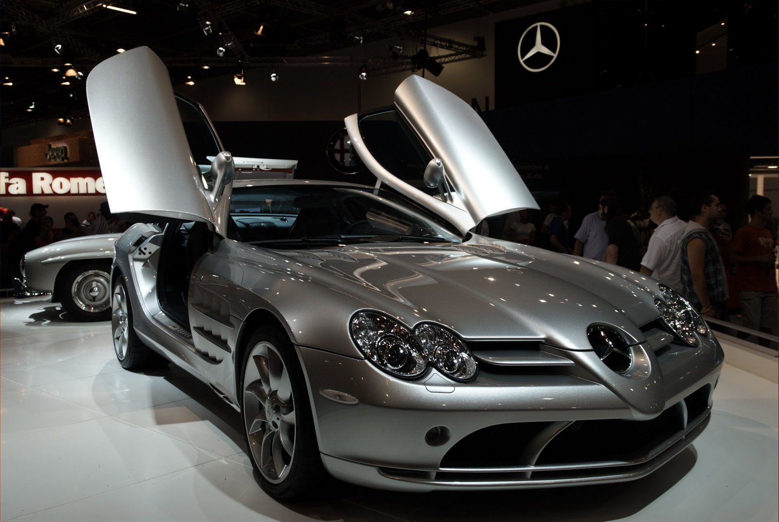 McLaren Mercedes SLR